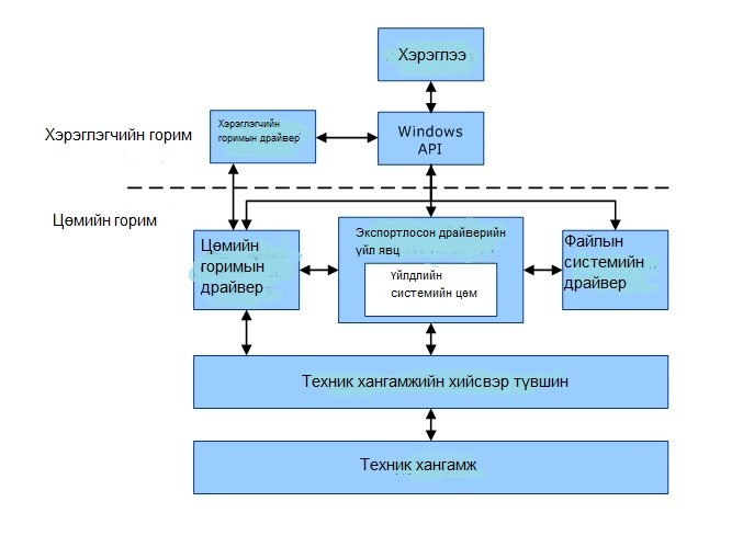 Монгол: Энэ диаграмм хэрэглэгчийн горим болон цөмийн горим бүрэлдэхүүн хэсгүүдийн хоорондын харилцаа холбоог харуулж байна.